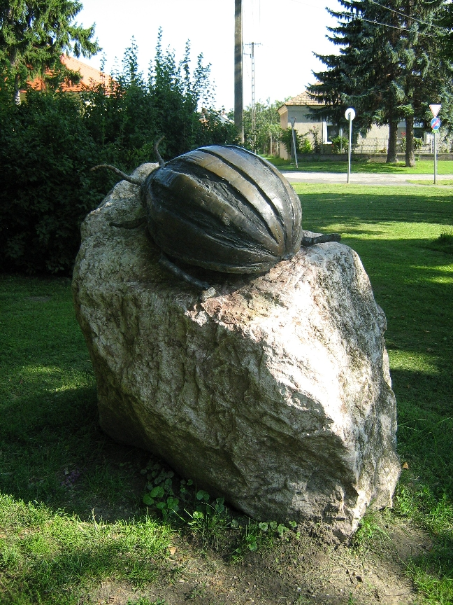 Krumplibogár-szobor, Hédervár, Magyarország